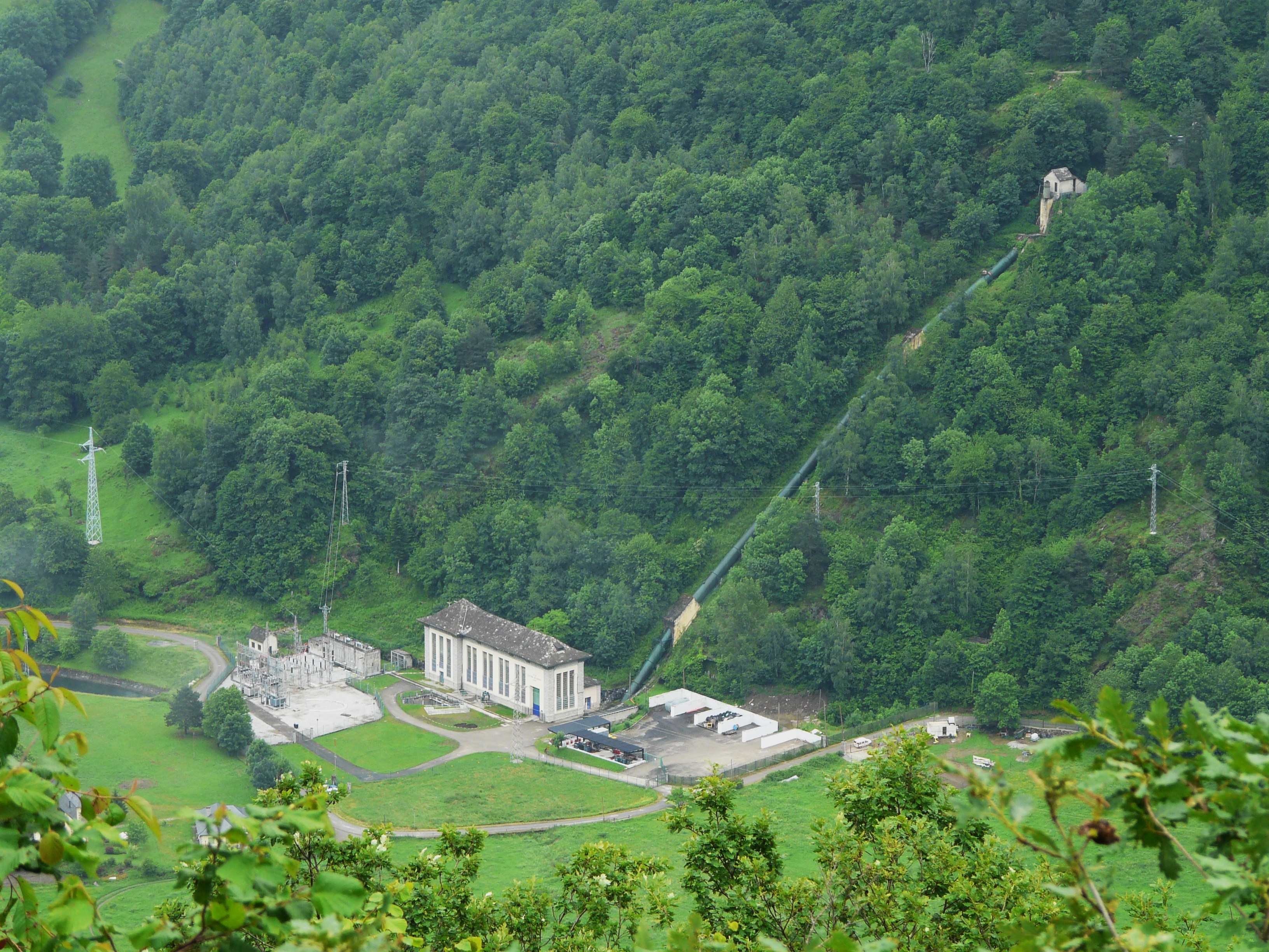 Centrale hydroélectrique de Bossòst, Val d'Aran, Catalogne, Espagne.